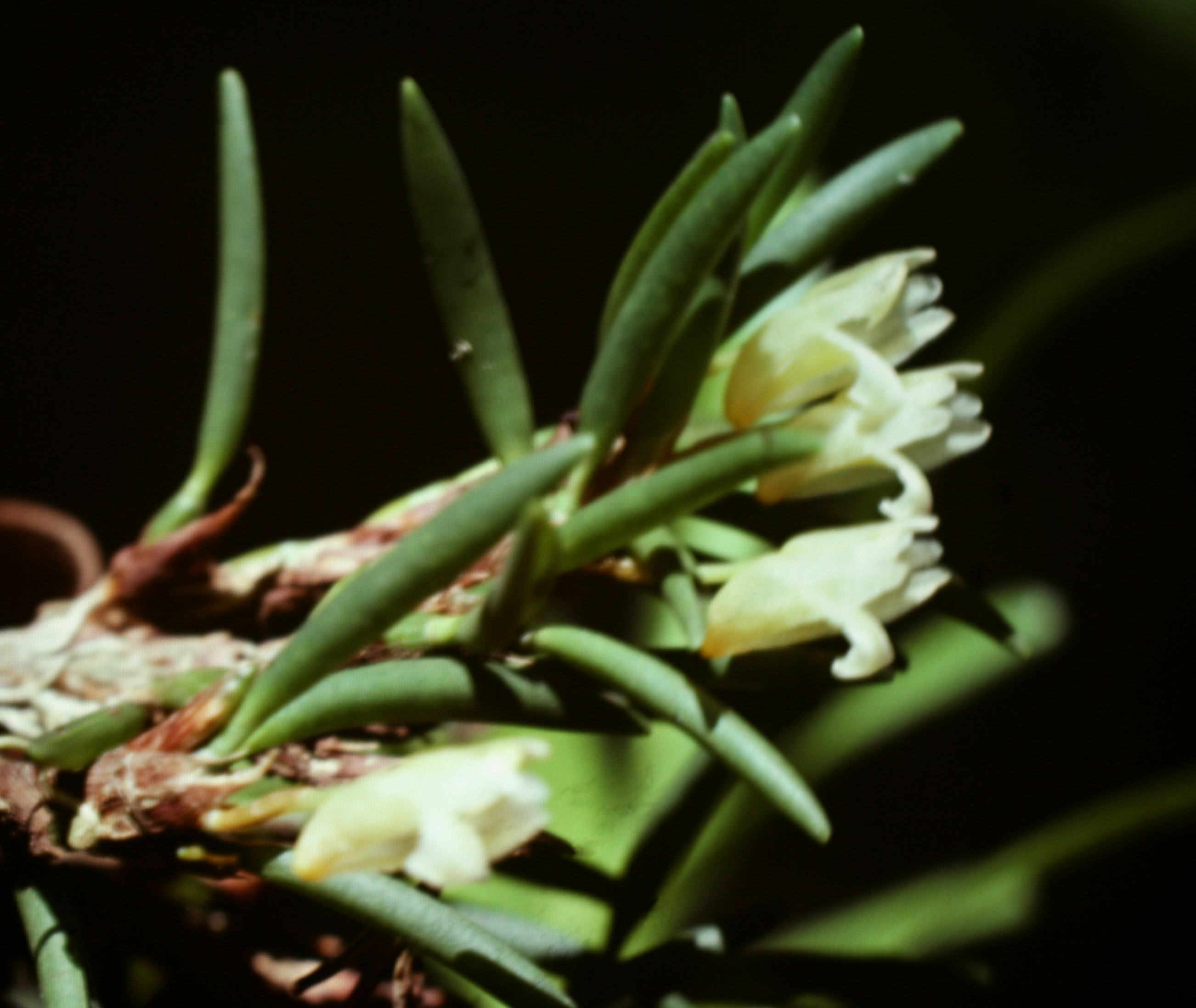 Maxillaria uncata, Suriname.